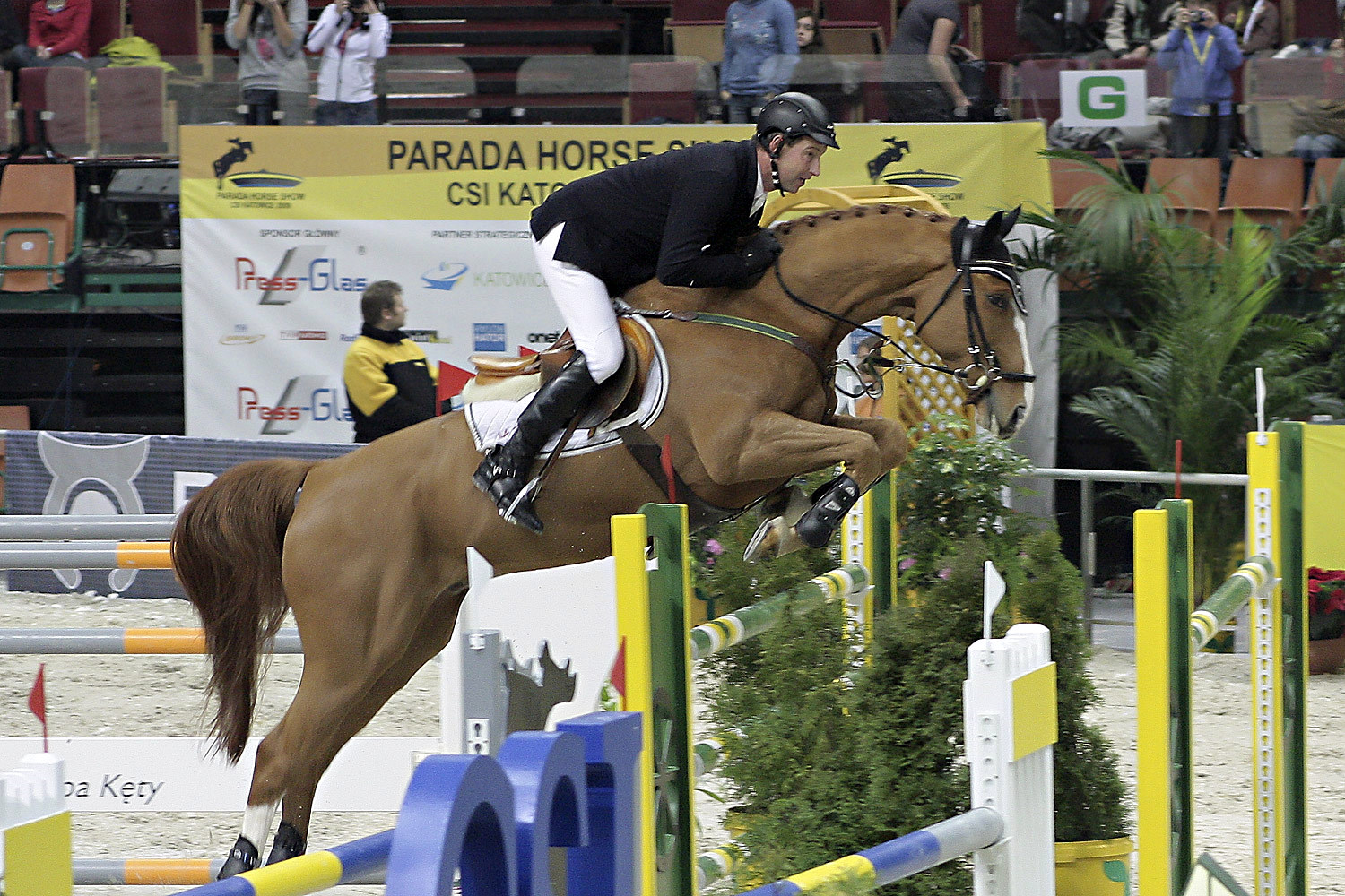 Franke Sloothaak (na Allegro LS La Silla), CSI Katowice, 05.12.2009 r.